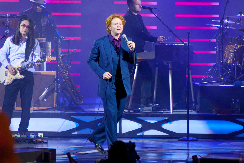 Simply Red en Viña del Mar, Chile